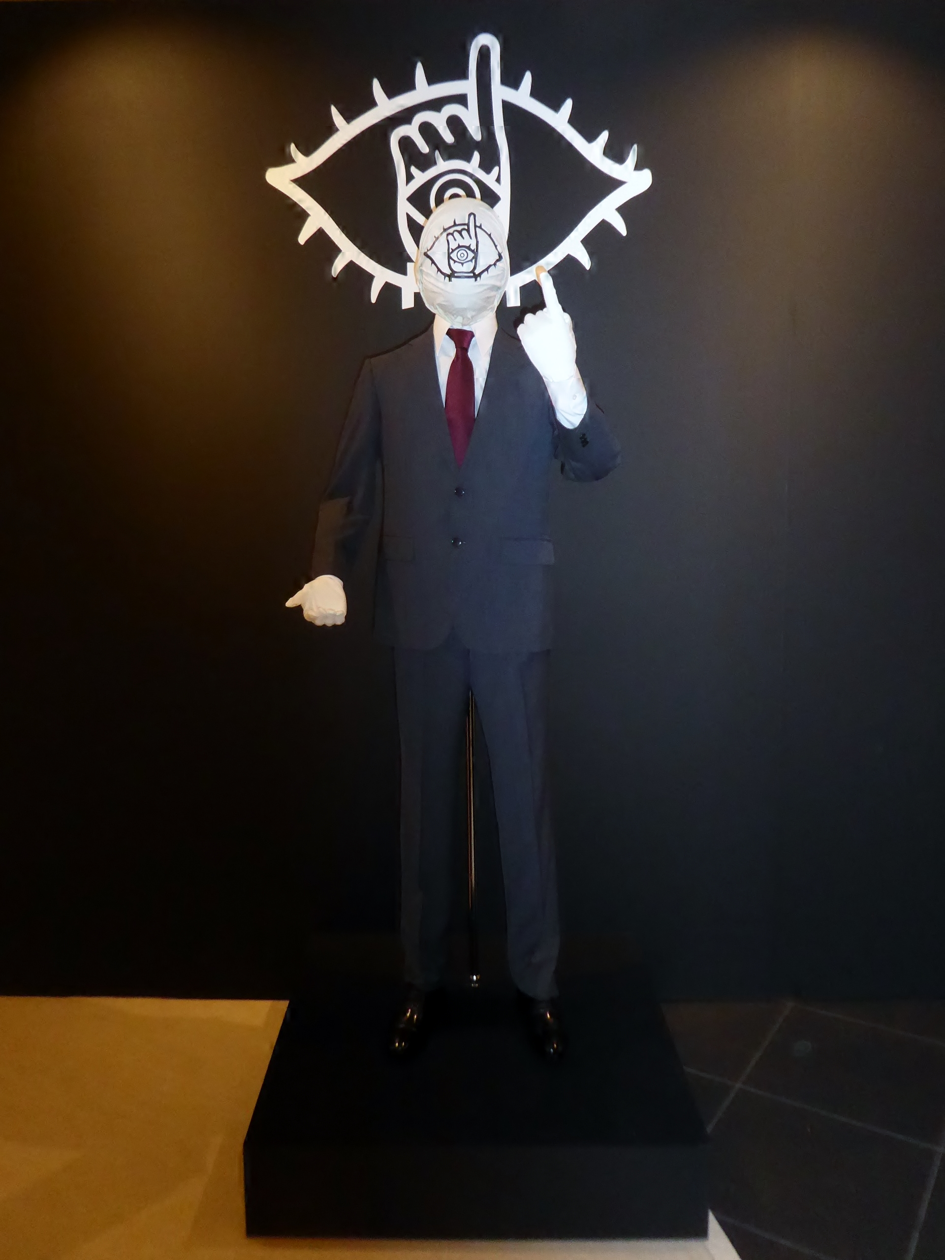 『20世紀少年』シリーズに登場する「ともだち」のマネキンを撮影。